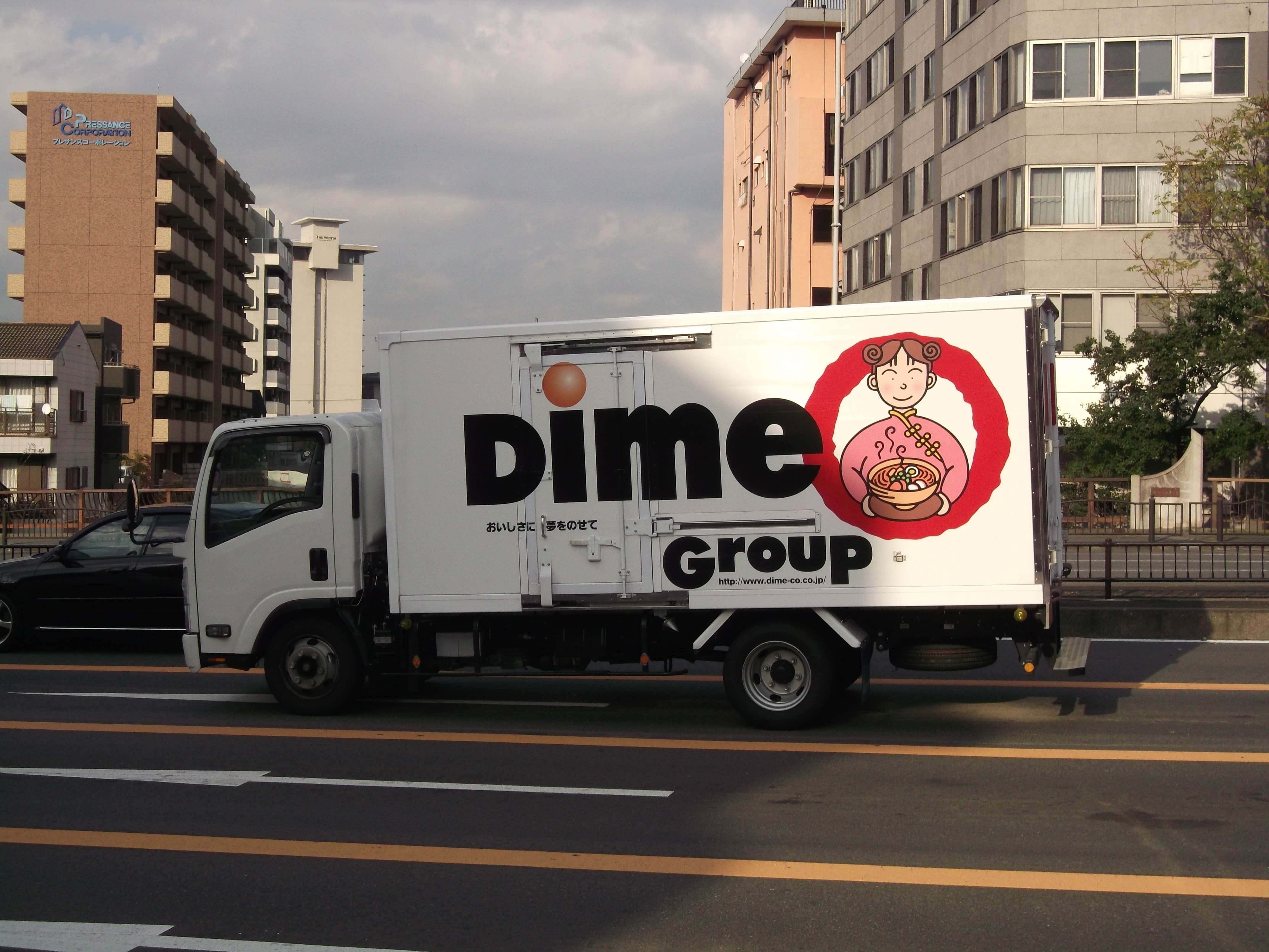 三重県伊勢市に本社を置くダイムの輸送用トラック。名古屋市幅下橋上を走行中。